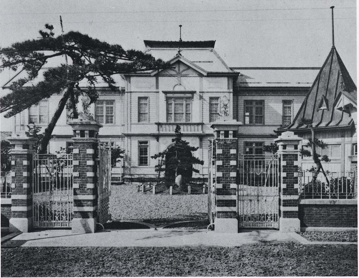 官立新潟専門学校正門（新潟医科大学の前身・後の岡山大学医学部の前身）